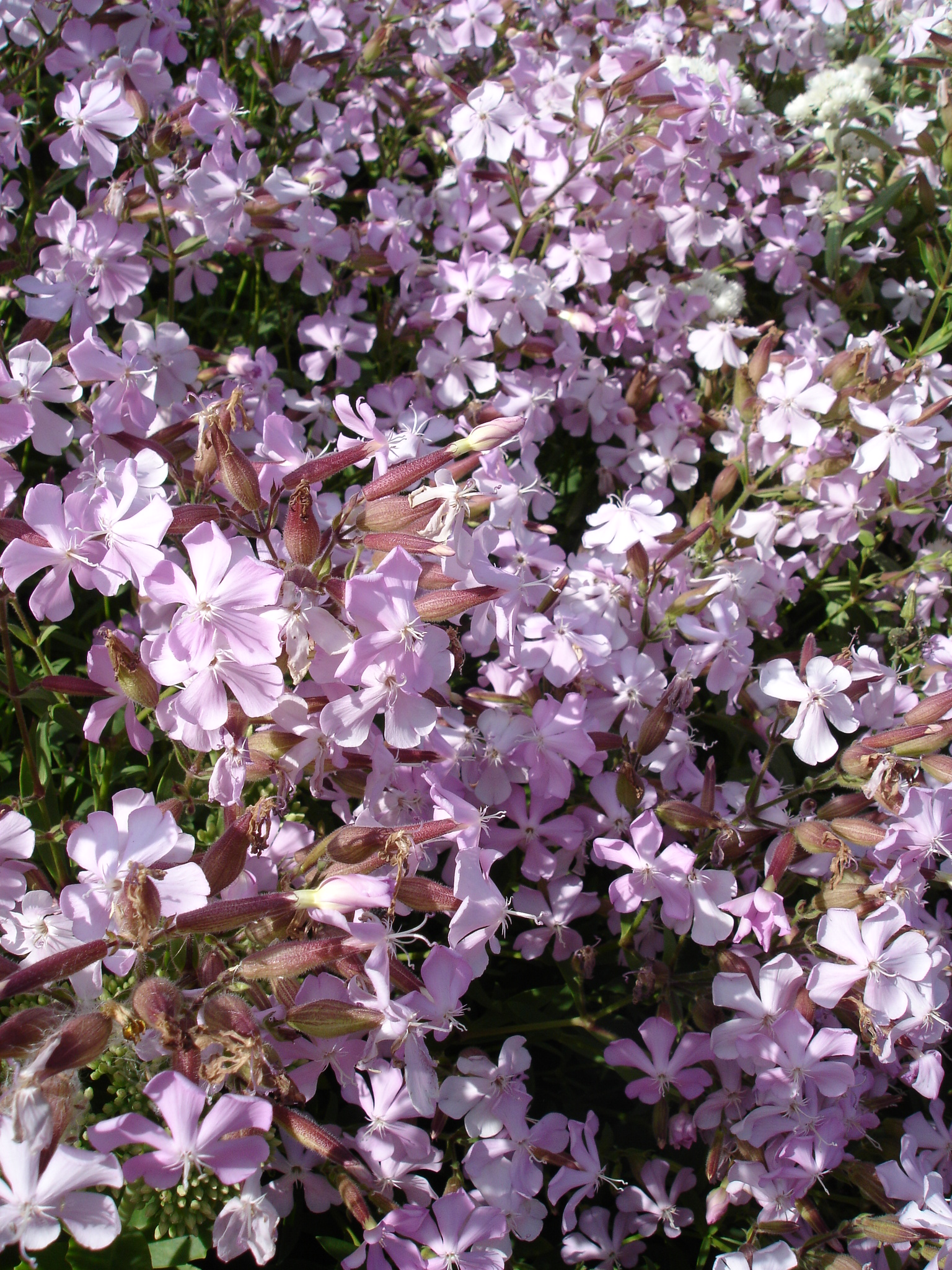 Saponaia ×lempergii